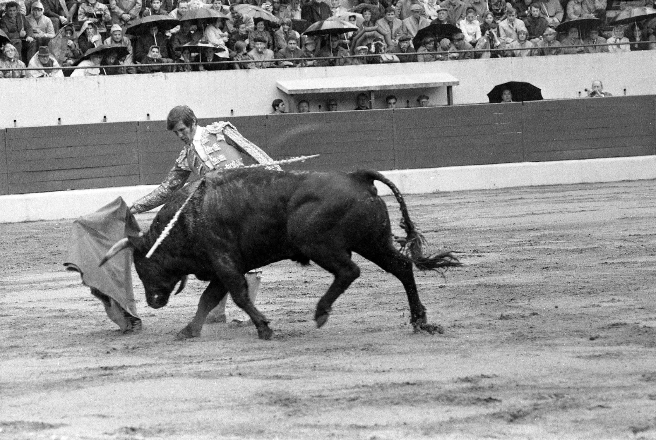 Corrida aux Arènes du Soleil d'Or (quartier des Arènes). 7 mai 1970. Scène de tauromachie. Au premier plan El Cordobés effectue une passe de muleta avec le taureau (vue de profil) ; en arrière-plan premiers rangs des gradins avec spectateurs. Observation: Pour connaître les caractéristiques du taureau (âge, poids...), voir dans le fonds bibliothèque le document intitulé "Arènes du Soleil d'Or (avril 1955 - octobre 1966)", cote 2397. Ce document compile les copies des notes manuscrites prises lors des corridas.